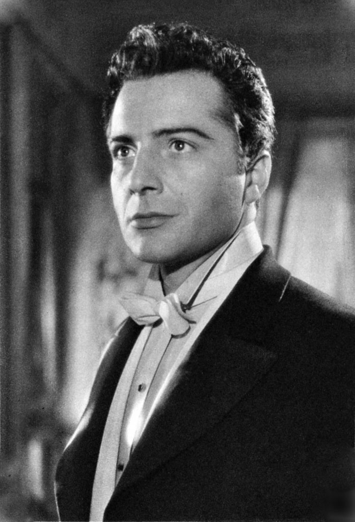 photo from magazine, Archivio personale (1952)